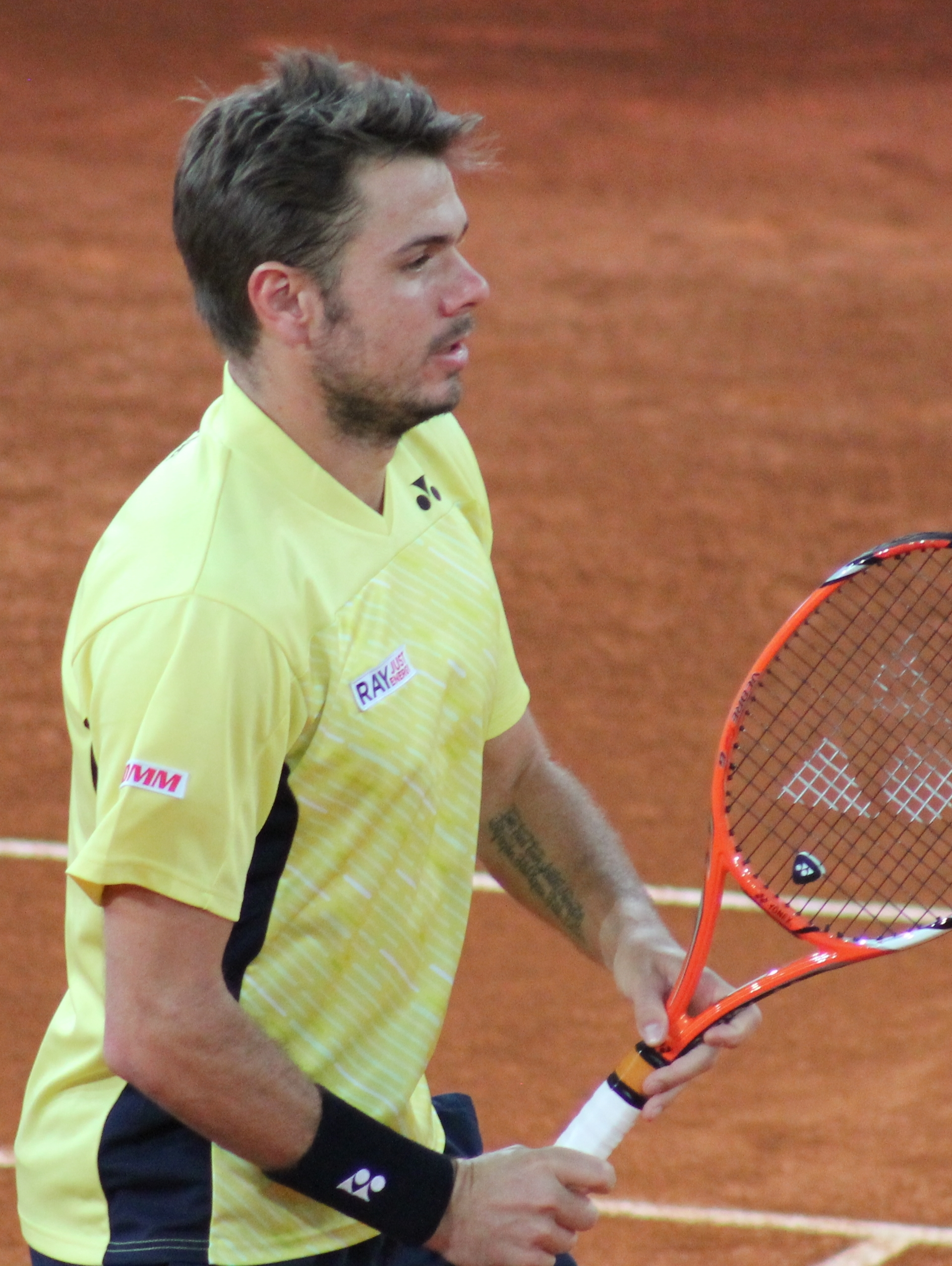 Wawrinka MA14 (35)